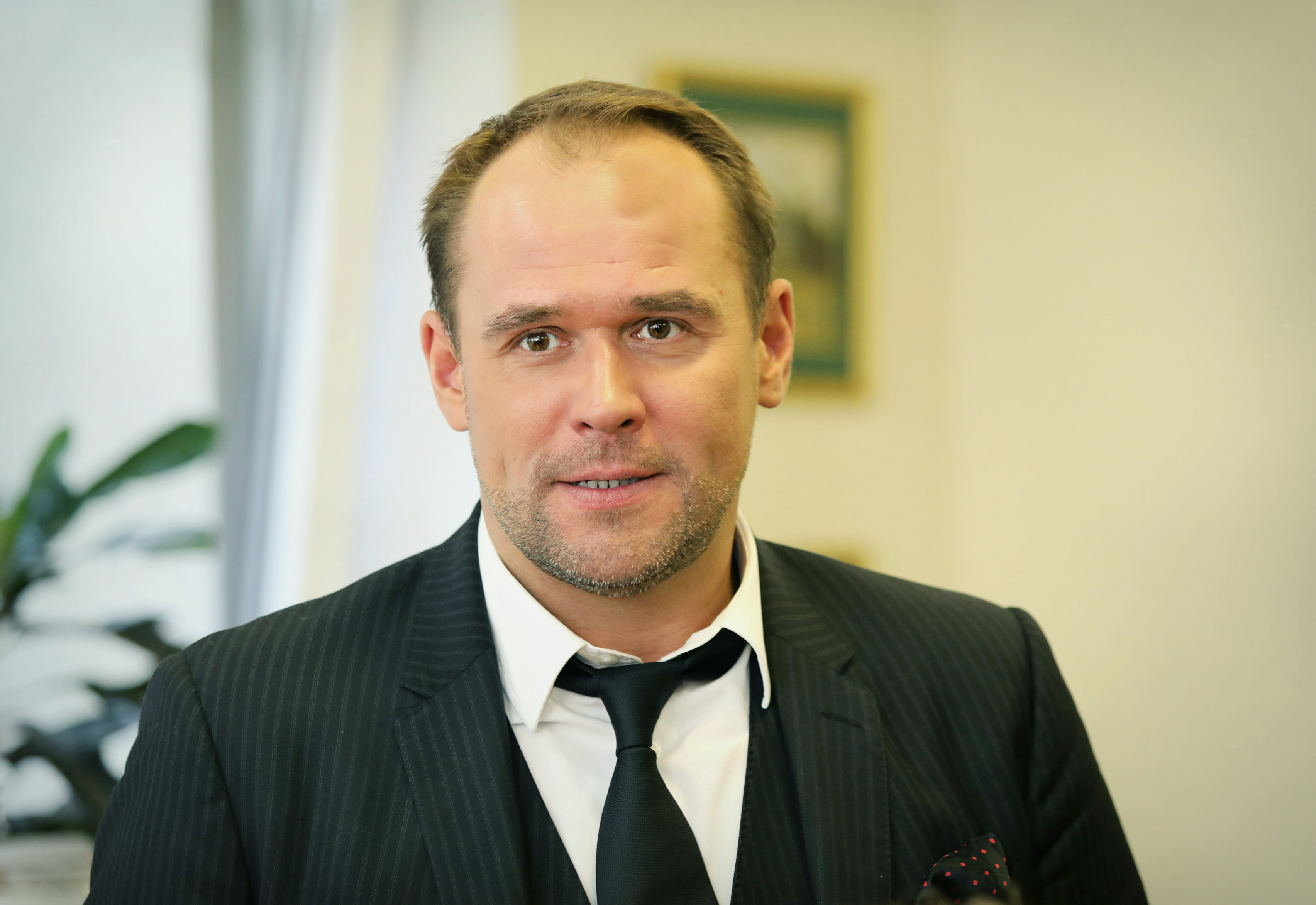 Максим Аверин на Дне книгодарения в Российской государственной детской библиотеке.